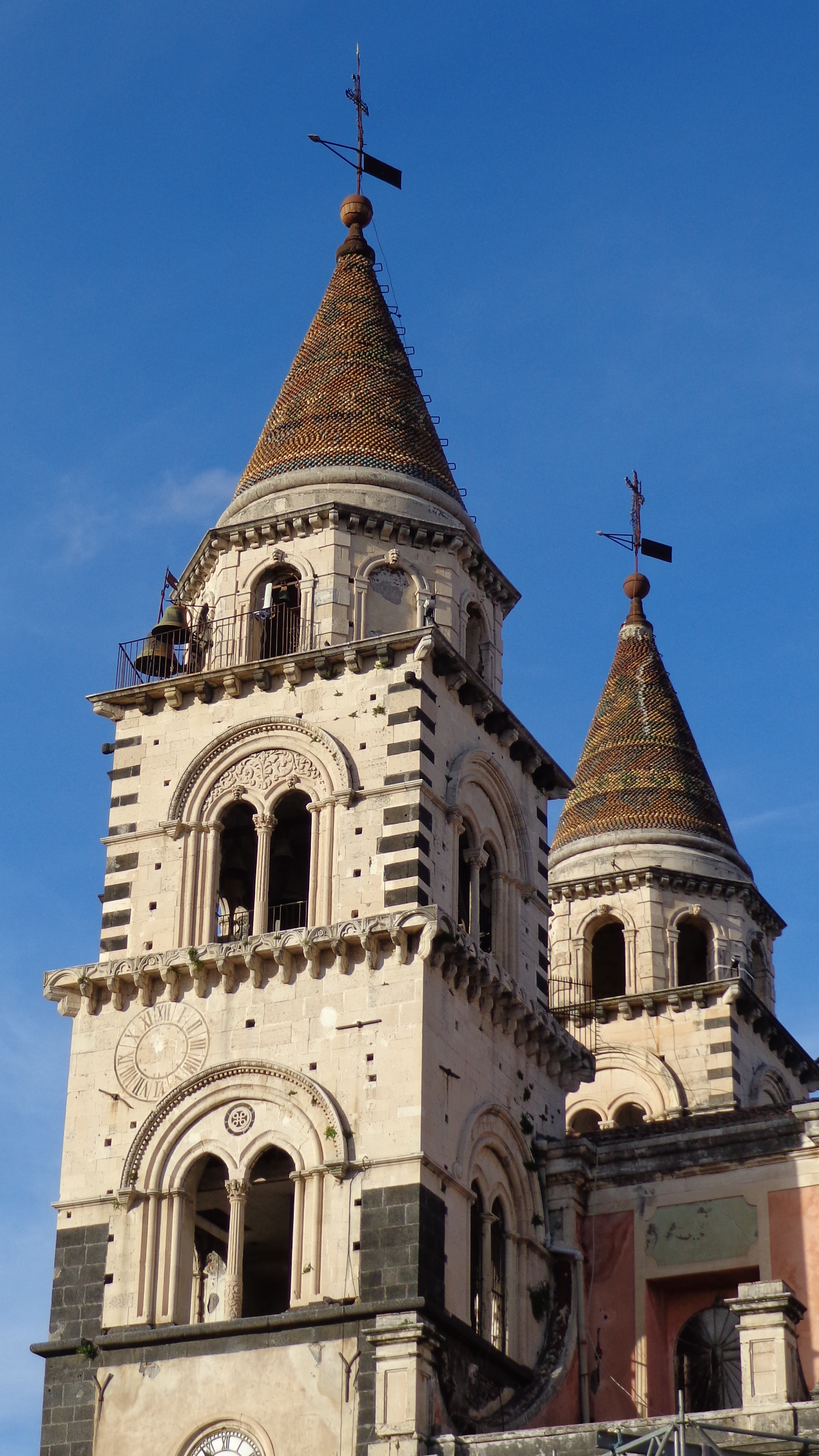 I campanili del Duomo